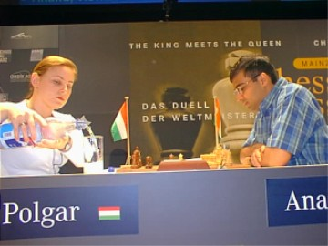 Judit Polgar und Viswanathan Anand, Chess Classic Mainz 2003.